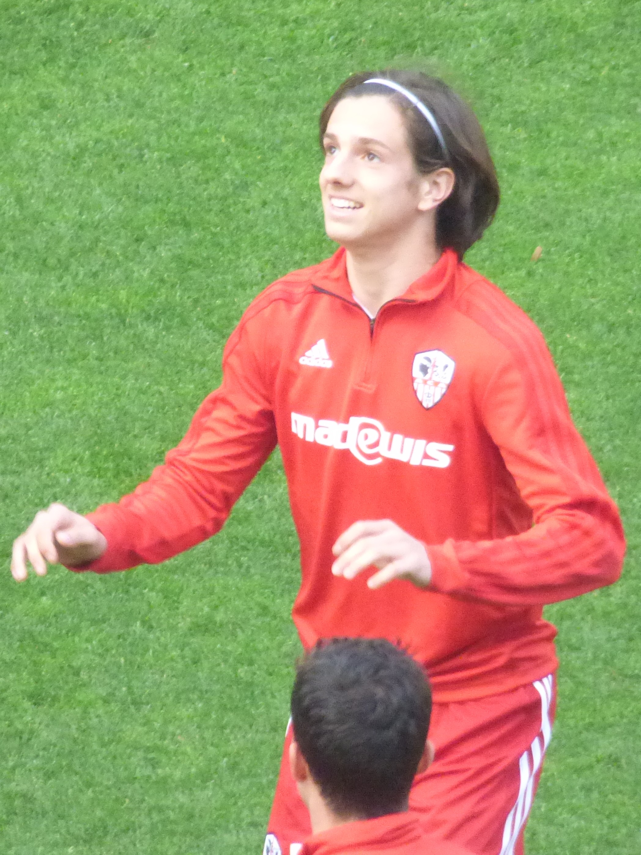 Felix Tomi avant le match RC Lens - AC Ajaccio, comptant pour la dix-neuvième journée du championnat de France de Ligue 2 2018-2019, le 22 décembre 2018, au Stade Bollaert-Delelis de Lens.